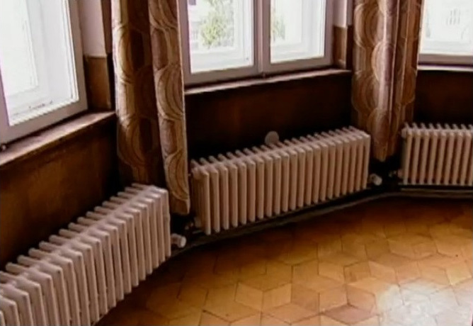 An dieser Stelle stand das Sofa, auf dem sich Geli Raubal erschossen hat.